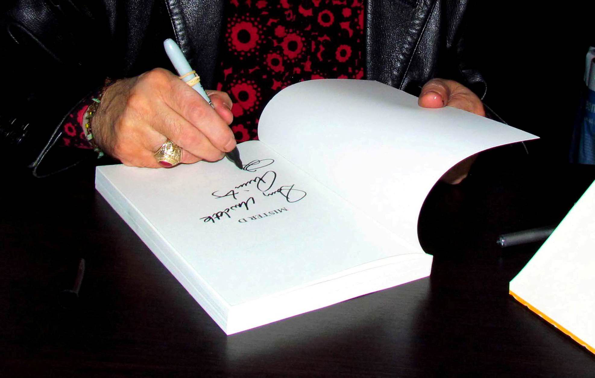 Dick Rivers signant son dernier ouvrage MISTER D, en mars 2012.